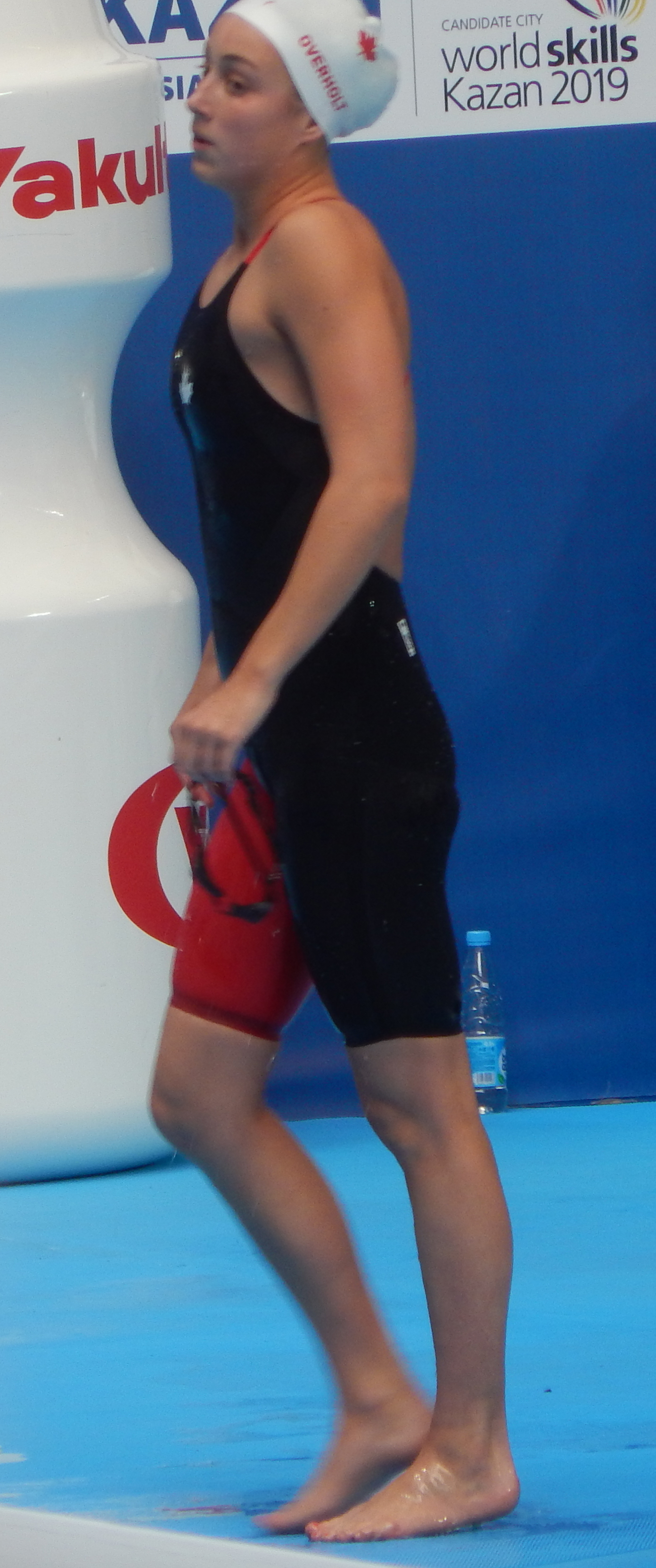 Эмили Оверхолт на чемпионате мира в Казани